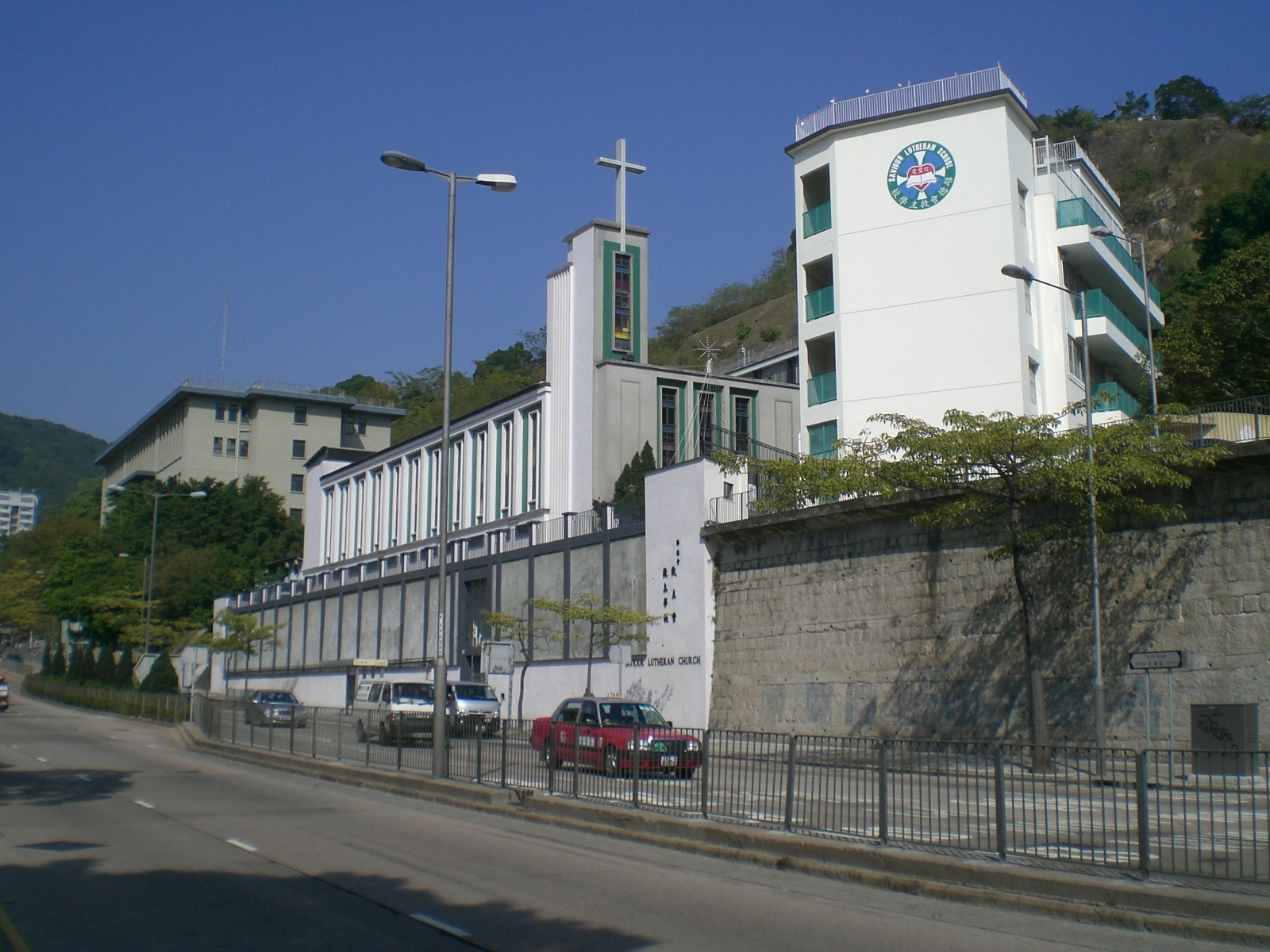 深水埗大埔道路德會救主學校及香港路德會救主堂